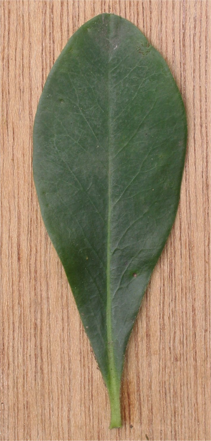 (nl: Amandelwolfsmelk blad) Euphorbia amygdaloides leaf